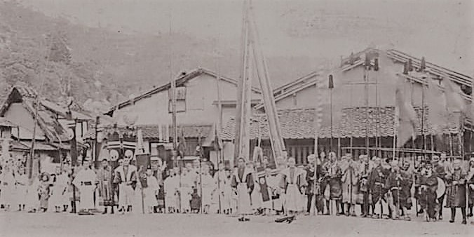 山王宮日吉神社の宮津祭「山王祭」の巡幸における記念写真